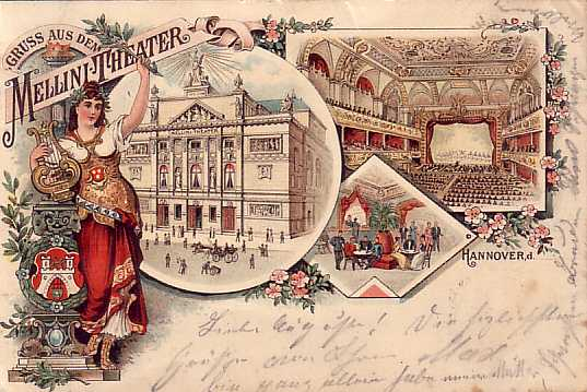 Ansichtskarte Gruß aus dem Mellini-Theater